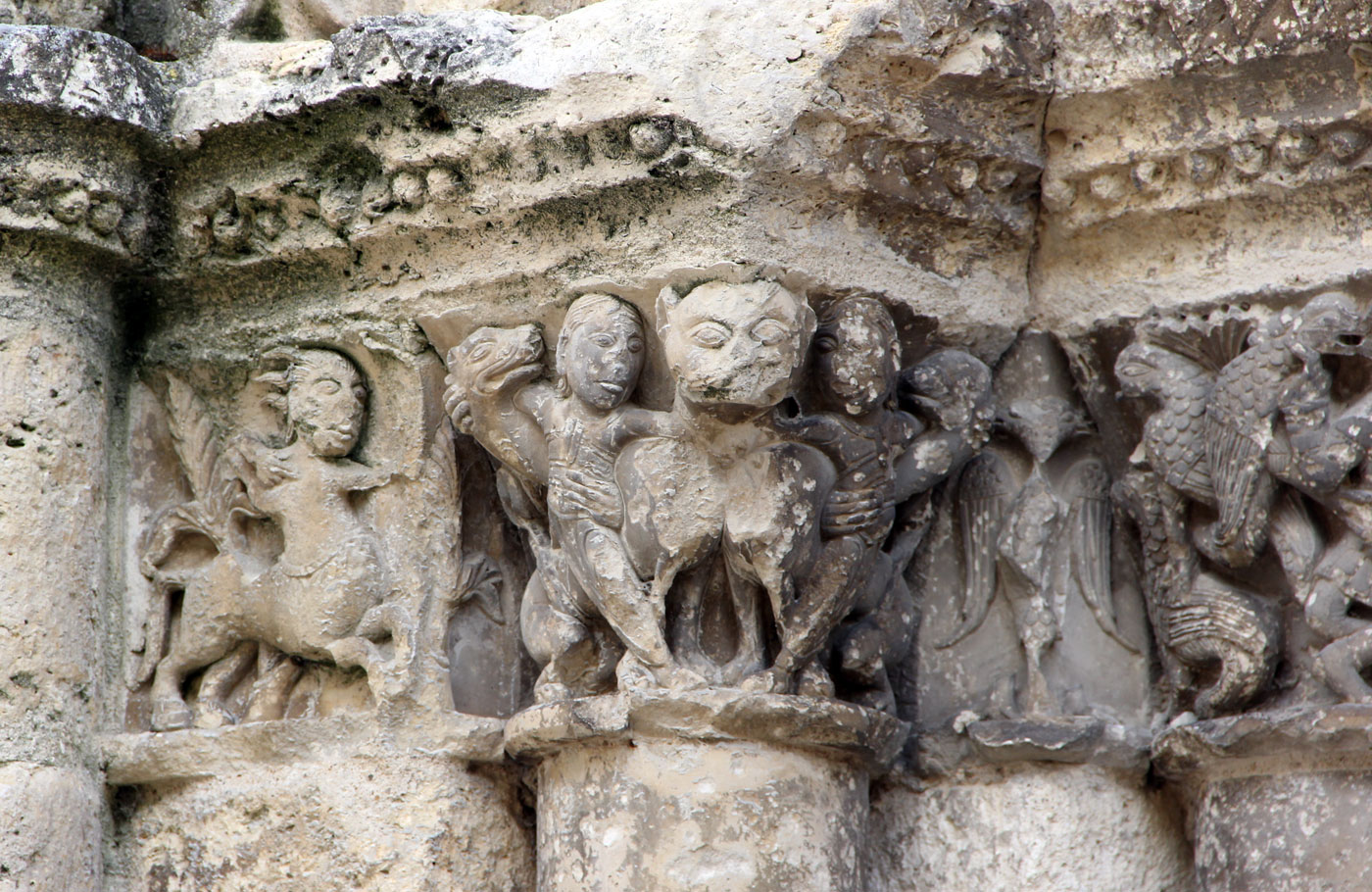 Chapiteau au centaure. Église Saint-Jacques. Aubeterre-sur-Dronne. Vers 1160.